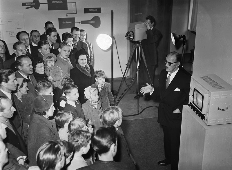 Tekniska Museet i Stockholm. Philips demonstrerar television. T.h. Intendent Altin